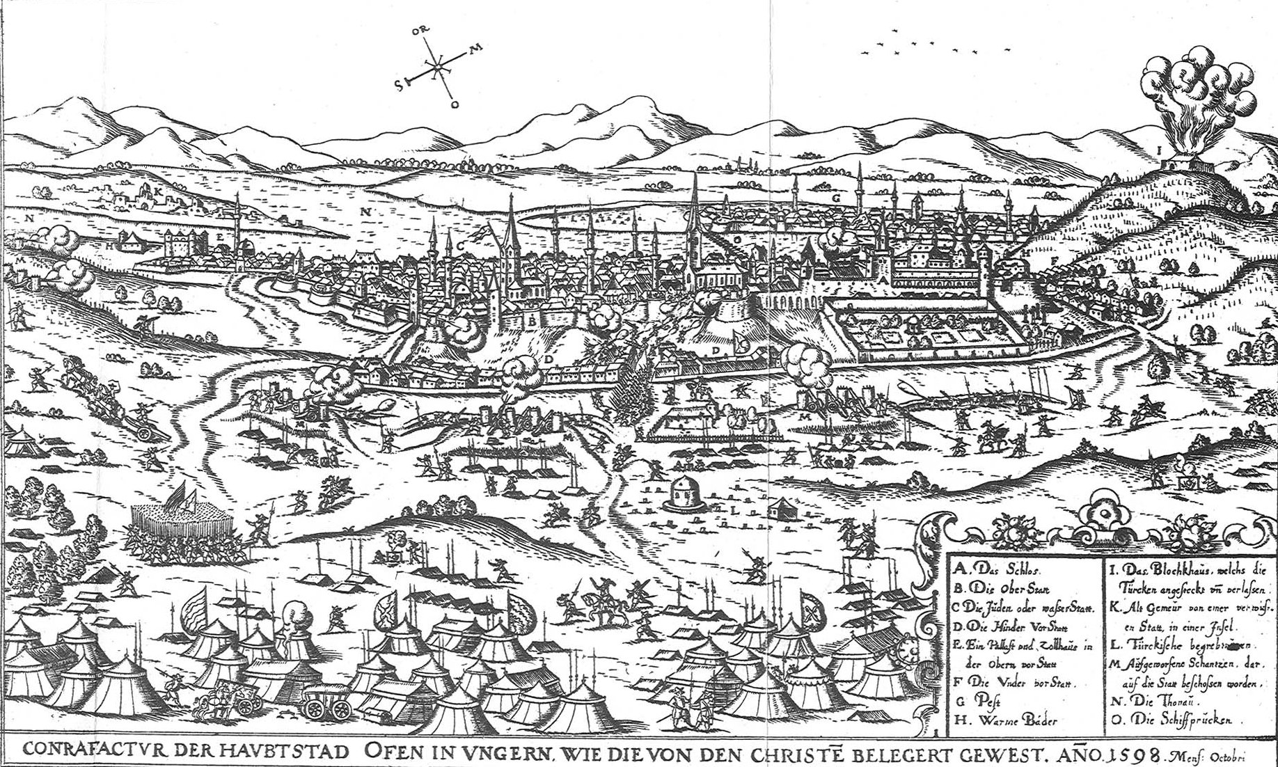 Buda ostroma 1598-ban. Johann Siebmacher. Hieronymus Ortelius: Chronologia Oder Historische beschreibung aller Kriegs empörungen vnd belägerungen der Stätt vnd Vestungen auch Scharmützeln vnd Schlachten so in Ober vnd Vnder Vngern auch Sibenbürgen mit dem Türcken von Ao. 1395 biß auff gegenwertige Zeitt gedenckhwürdig geschehen : Auch mit schönen Kupfferstücken sampt einer Mappen ... gezieret